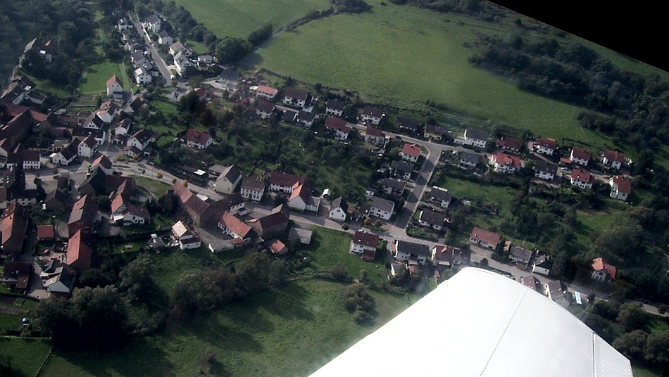 Rutsweiler an der Lauter (teilweise) aus der Luft This is a retouched picture, which means that it has been digitally altered from its original version. Modifications: gedreht, beschnitten, Spiegelungen reduziert, Kontrast optimiert. The original can be viewed here: Rutsweiler lauter air.jpg. Modifications made by Nyks.